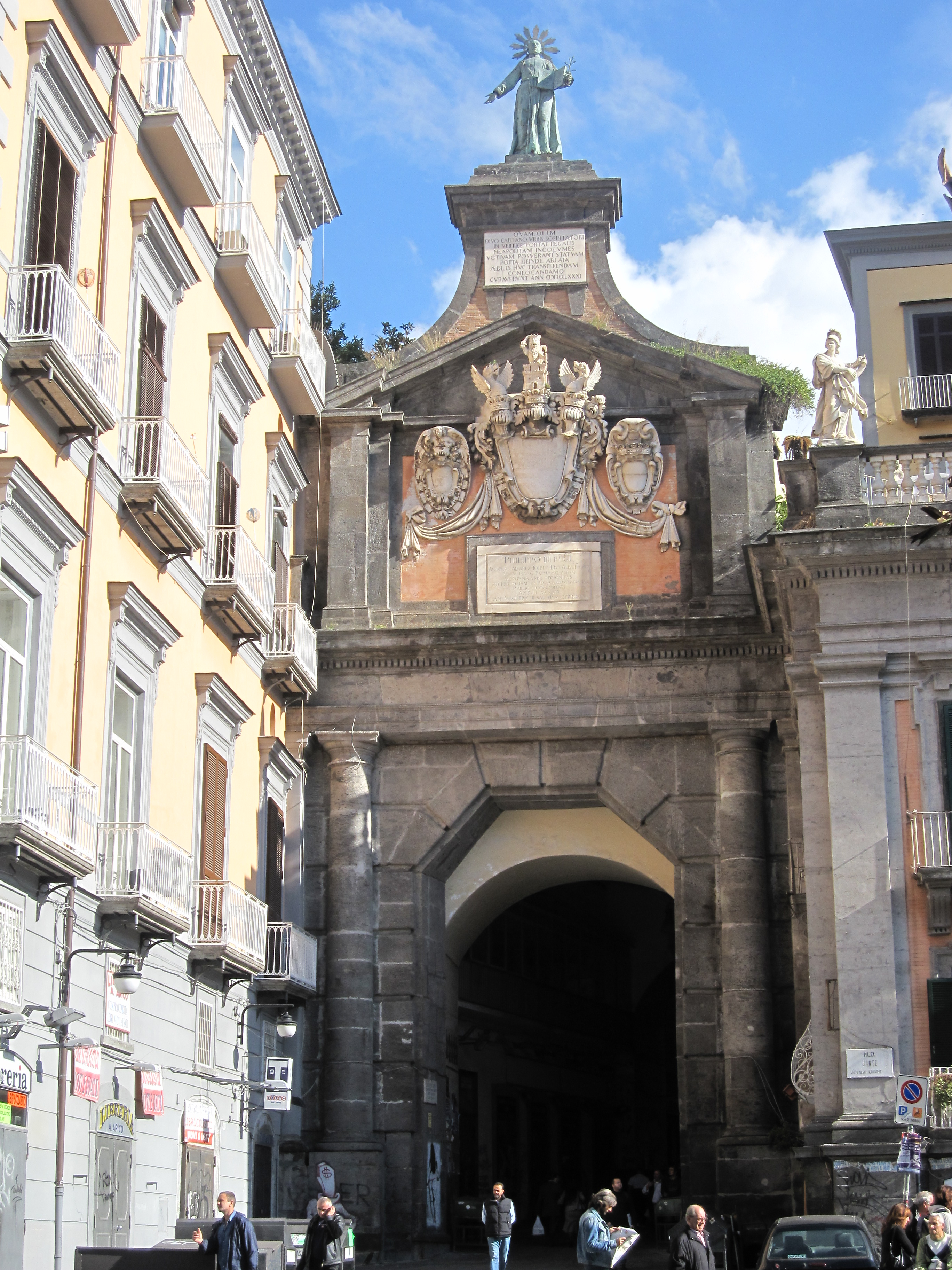 Port'Alba Vista da Piazza Dante. Napoli.